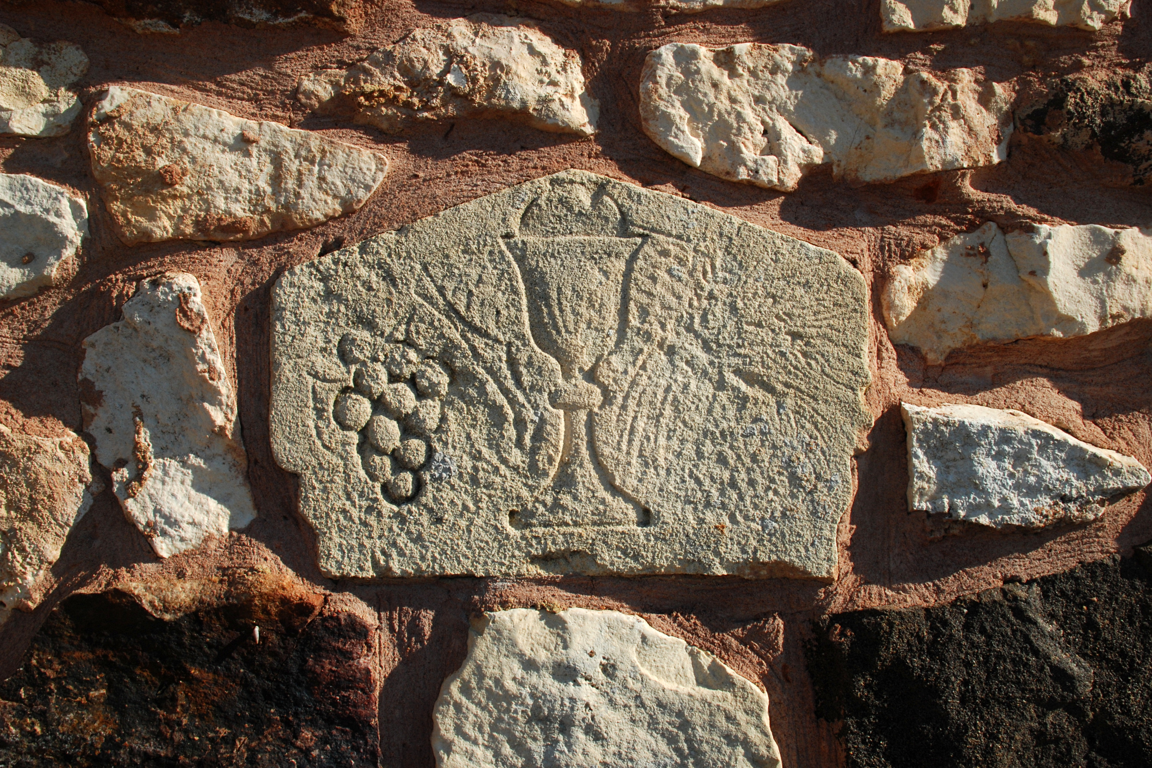 France - Gard - Chapelle Saint-Privat de Pouzilhac